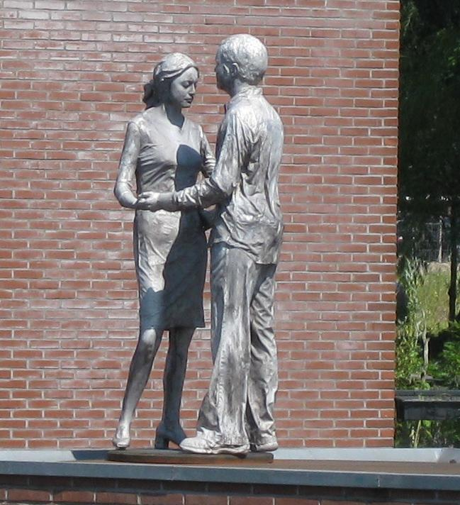 Dansend Paar, kunstwerk van Herman Lamers, Brons 2005, G.J.Scheurleerweg Amsterdam-Noord